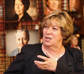 Françoise Cartron